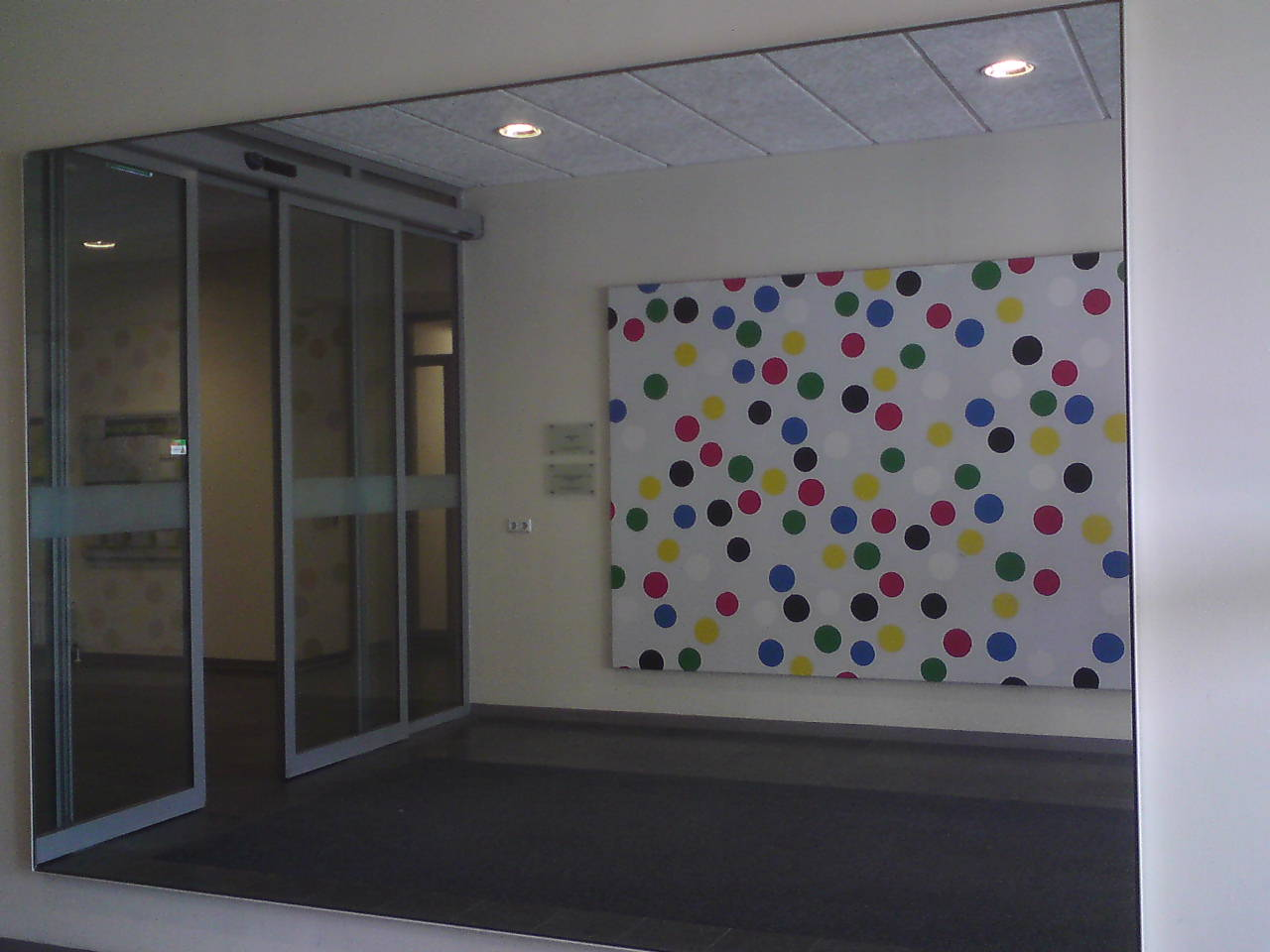 Werk: Bolletjeswand; Kunstenaar: Klaas Kloosterboer; Jaar: Onbekend; Straat: Ingang Stationszijde; Materiaal: Doek en een spiegel